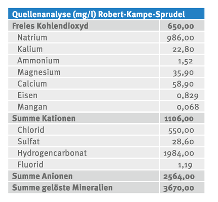 Quellenanalyse des Robert-Kampe-Sprudels